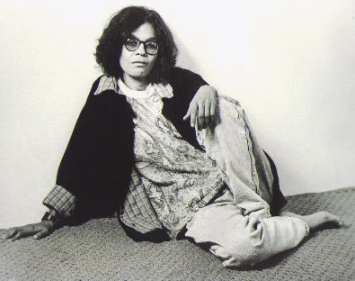 A poeta Tânia Martins.